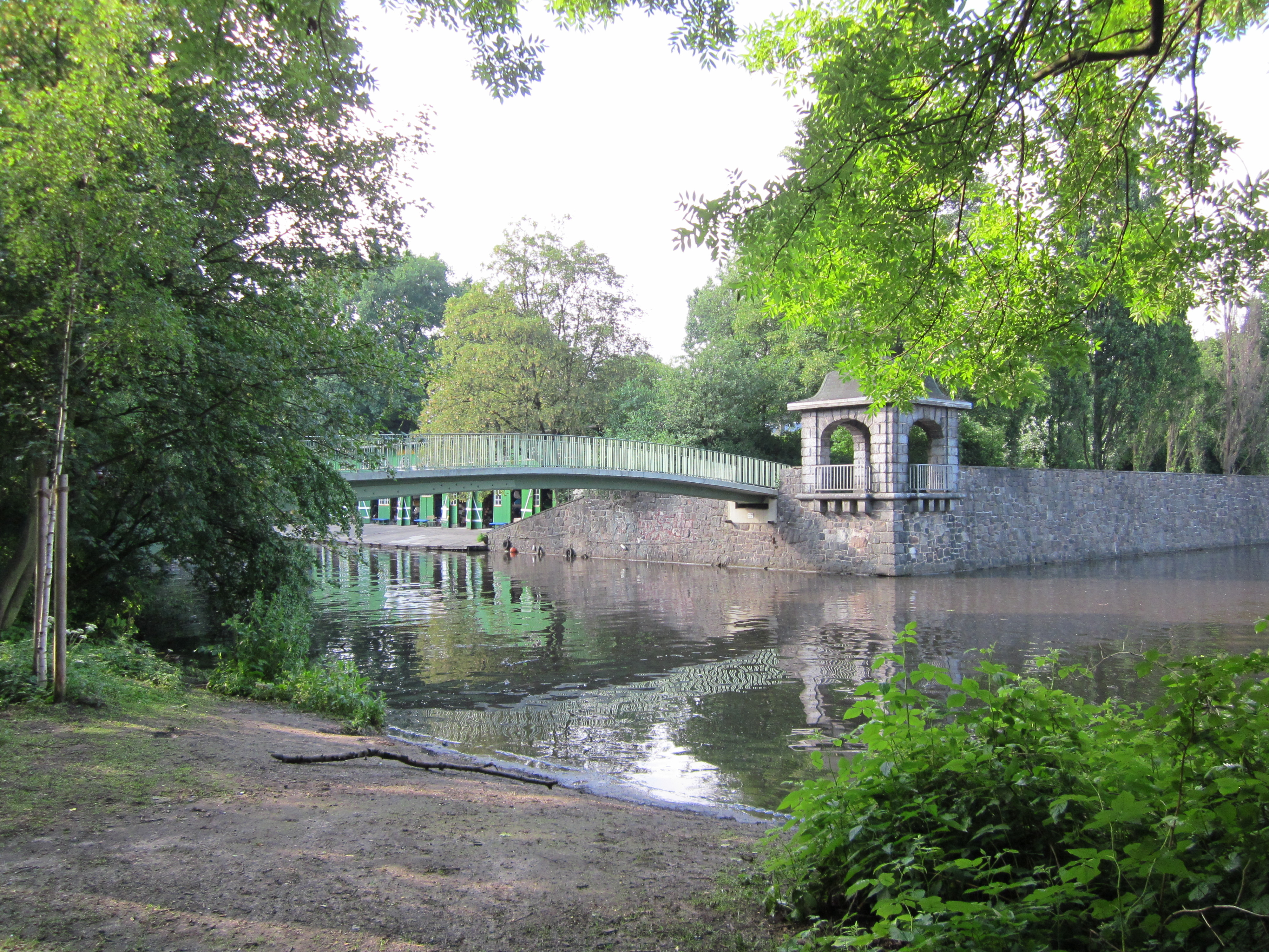 Mündung der Tarpenbek in die Alster bei Hayns Park in Eppendorf.